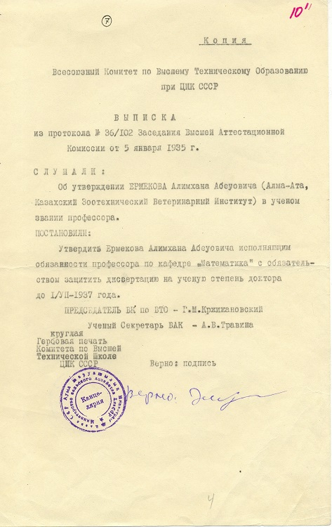 Выписка из протокола Атестационной комиссии «Об утверждении А.Ермекова в звании профессора», 1935 год (из личного архива К. Ускембаева)